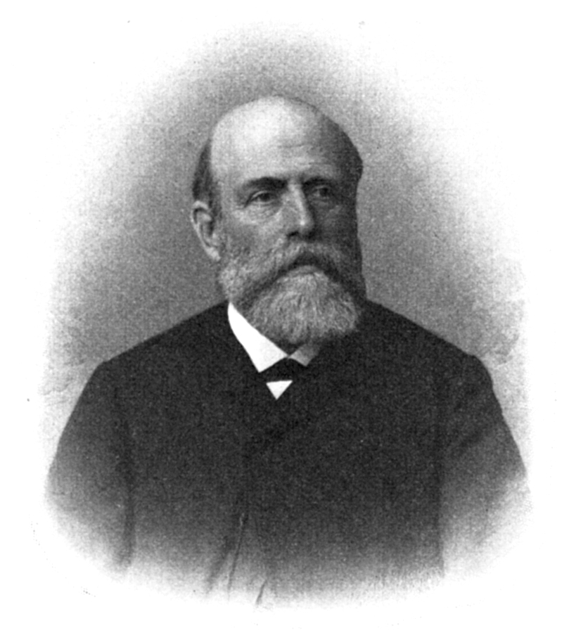 Prof. Dr. Hermann Kortum (1836-1904)